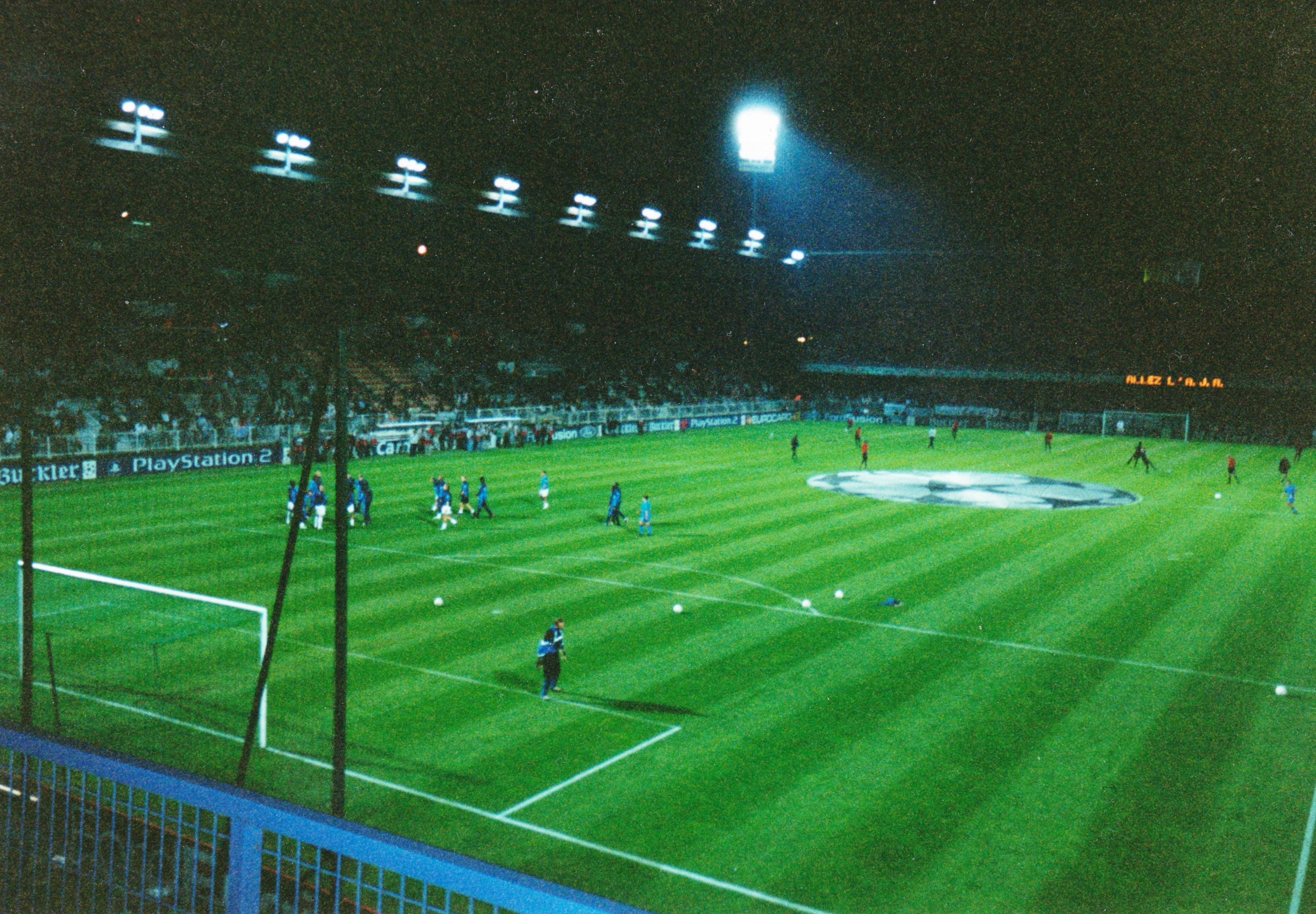 Champions League - Auxerre-Arsenal - 02 october 2002 - échauffement.